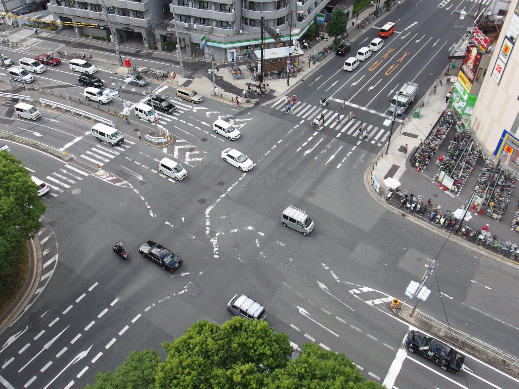 天神橋6交差点, 大阪府大阪市